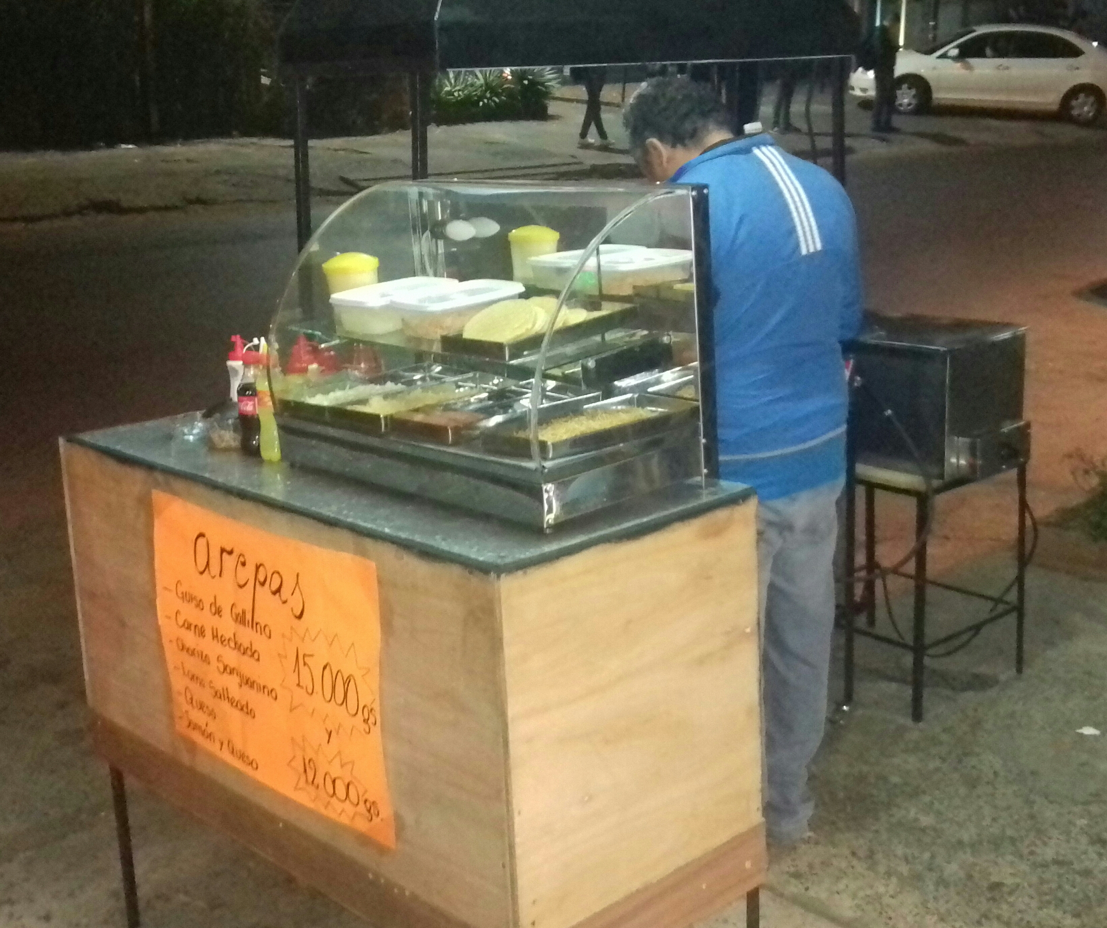 La diáspora venezolana en Paraguay ha hecho notar su presencia en varias ciudades del aquel país, con la cada vez más frecuente oferta gastronómica.